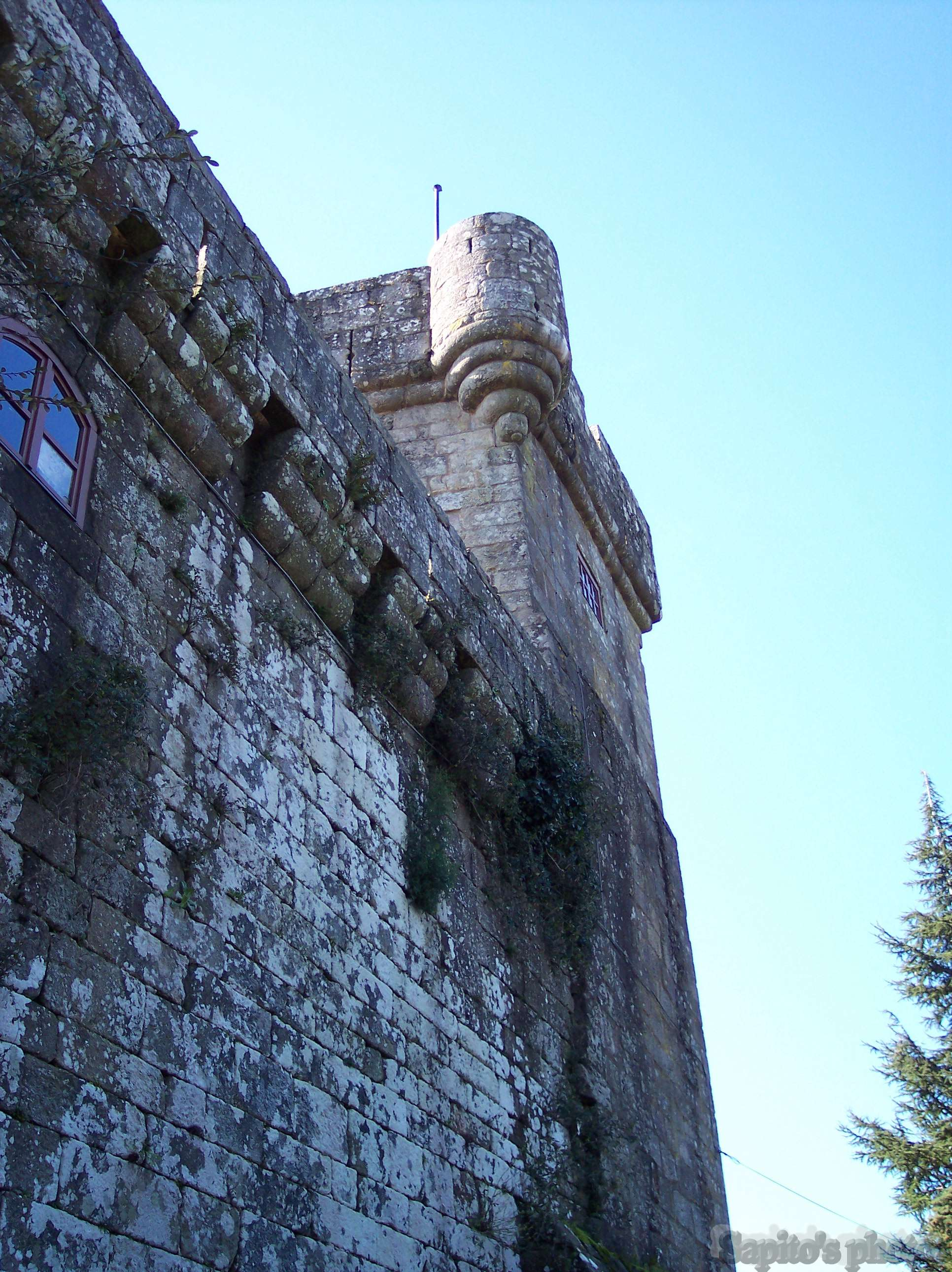 Castelo de Vilasobroso -Vista lateral da torre